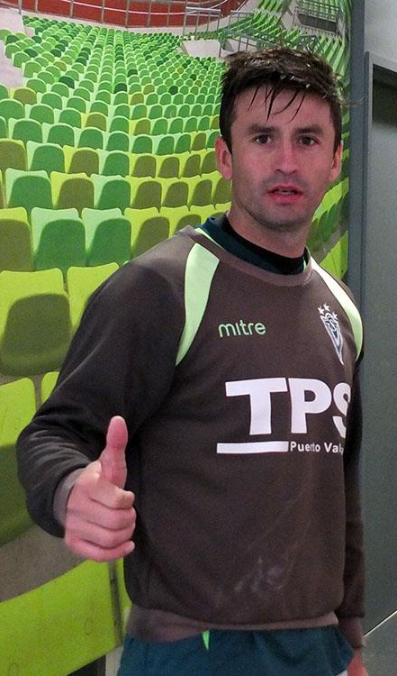 Edición de la fotografía "RobertoGutierrez.jpg", que muestra al jugador de fútbol Roberto Gutiérrez.